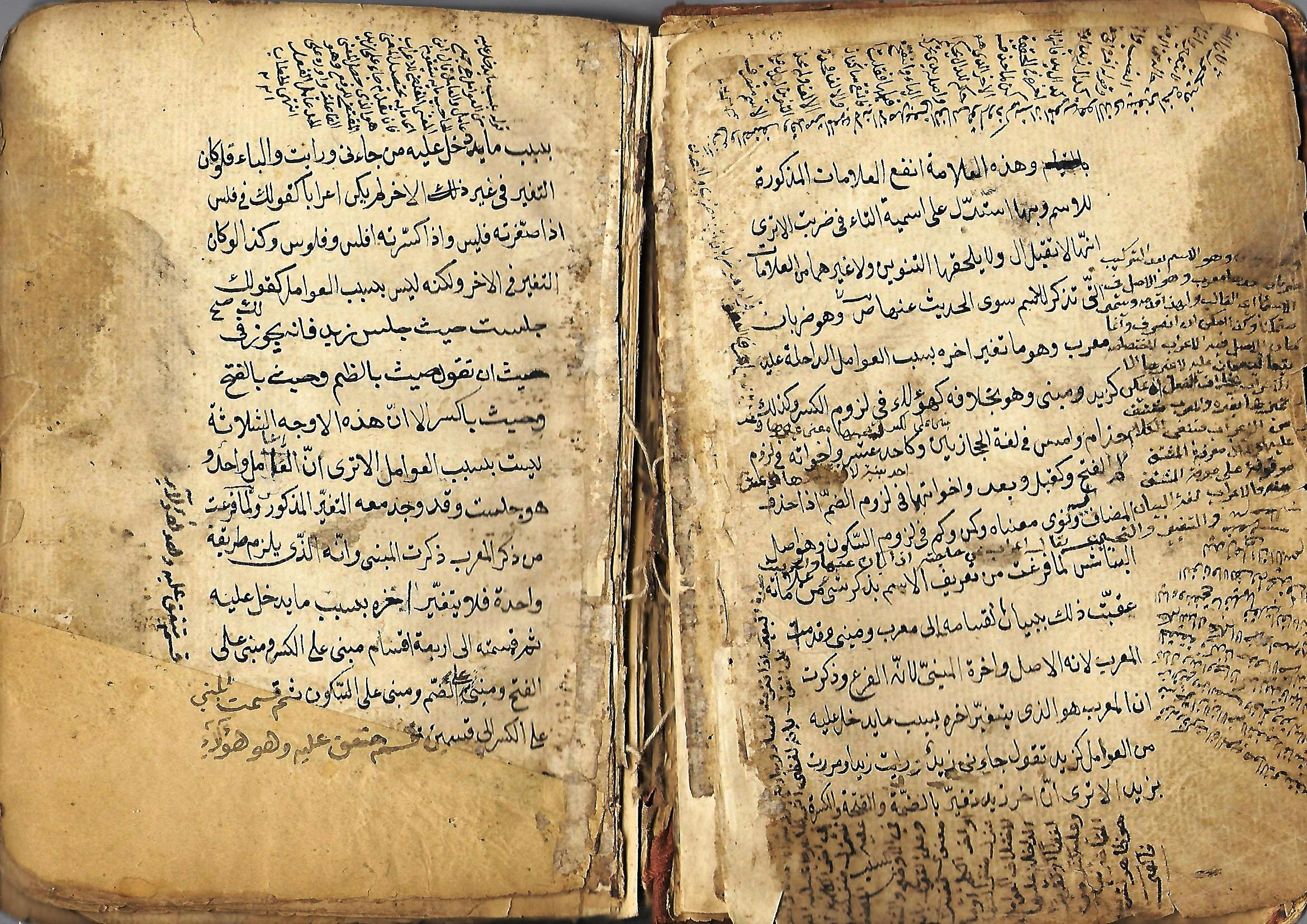 الصفحة الثالثة من كتاب شرح قطر الندى وبل الصدى للإمام جمال الدين ابن هشام الأنصاري، والمخطوط نسخ في بغداد عام 1240هـ، وهو من مقتنيات كتب ملا قاسم أفندي المفتي